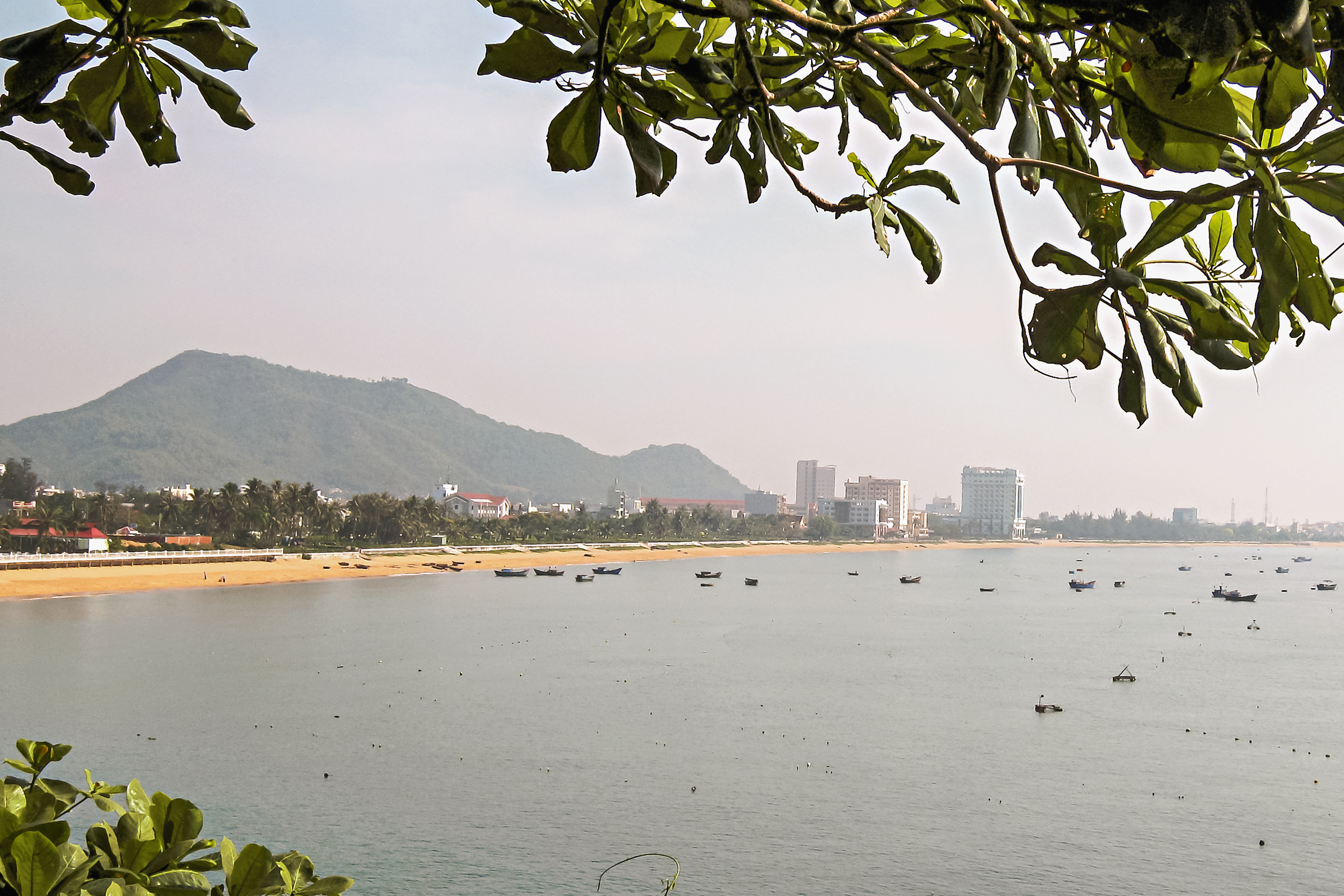 Trên đỉnh Gành Ráng nhìn về thành phố Quy Nhơn (Bình Định, Việt Nam).